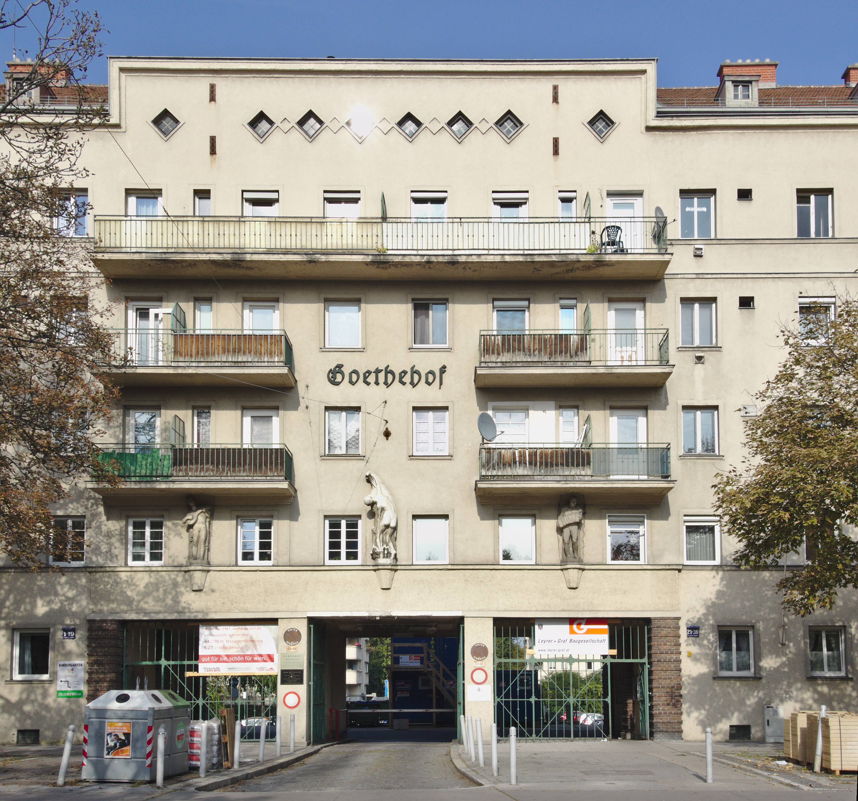 Kommunaler Wohnbau, Goethe-Hof